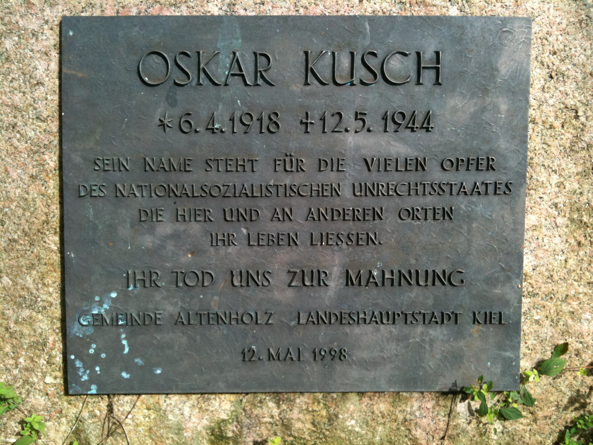 Tafel zum Gedenken an Oskar Kusch in Altenholz-Knoop